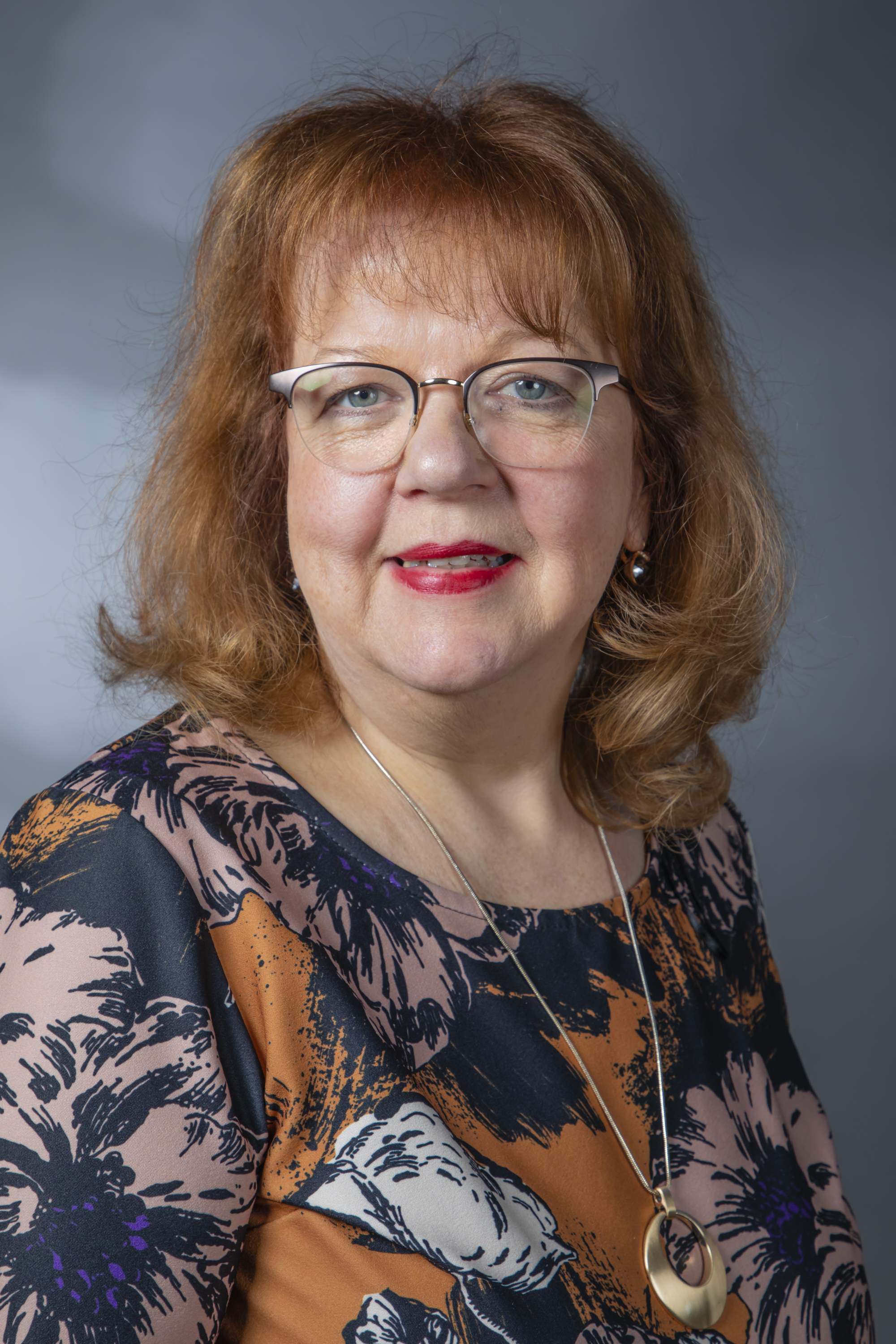 Inge Blask Wikipedia-Landtagsprojekt NRW 2019 22 March 2019 in DüsseldorfThis file was taken during the project “Landtag Nordrhein-Westfalen 2019” (German). Organisation: Olaf KosinskyPhotography: Foto-AG Gymnasium Melle: Karsten Mosebach, Anna Borchert, Lara Diekmann, Marieke Eckjans, Neele Grieger, Charlotte Meyran, Carolin Möller, Leoni Potts, Alicia Wulbusch Usage information If you need more information how to use this file, please send an email to . The making of this document was supported by Skillshare. Personality rights warningAlthough this work is freely licensed or in the public domain, the person(s) shown may have rights that legally restrict certain re-uses unless those depicted consent to such uses. In these cases, a model release or other evidence of consent could protect you from infringement claims.